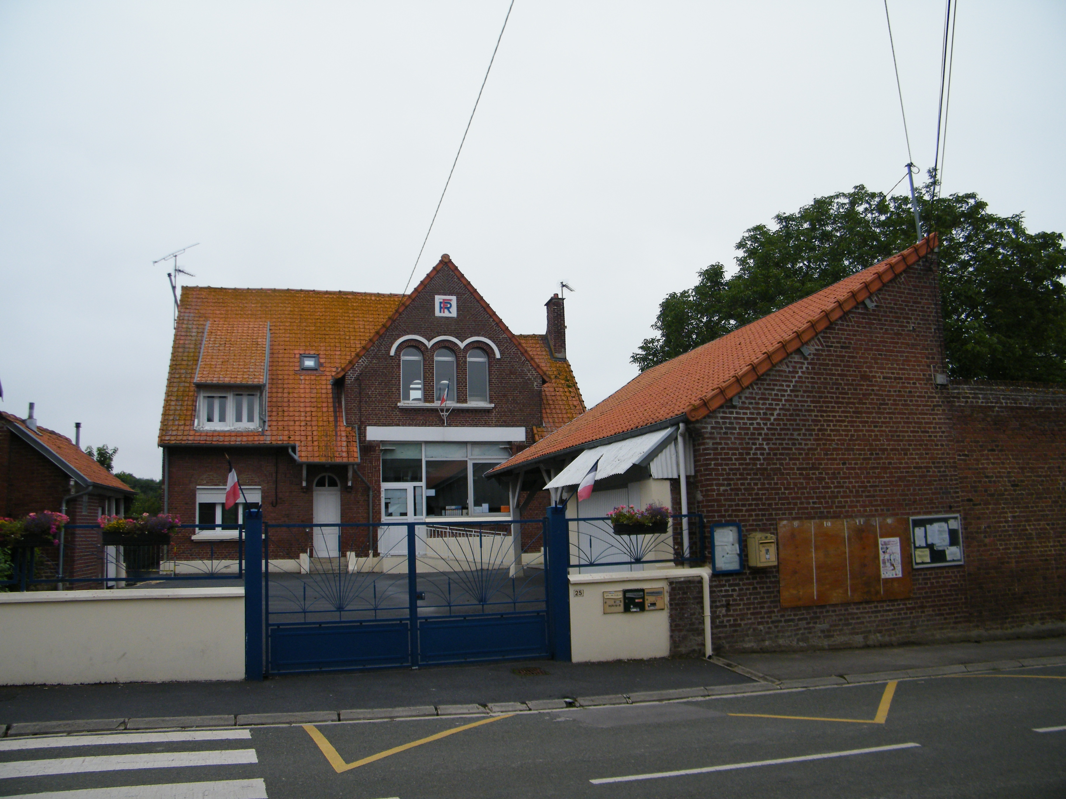 Mairie.